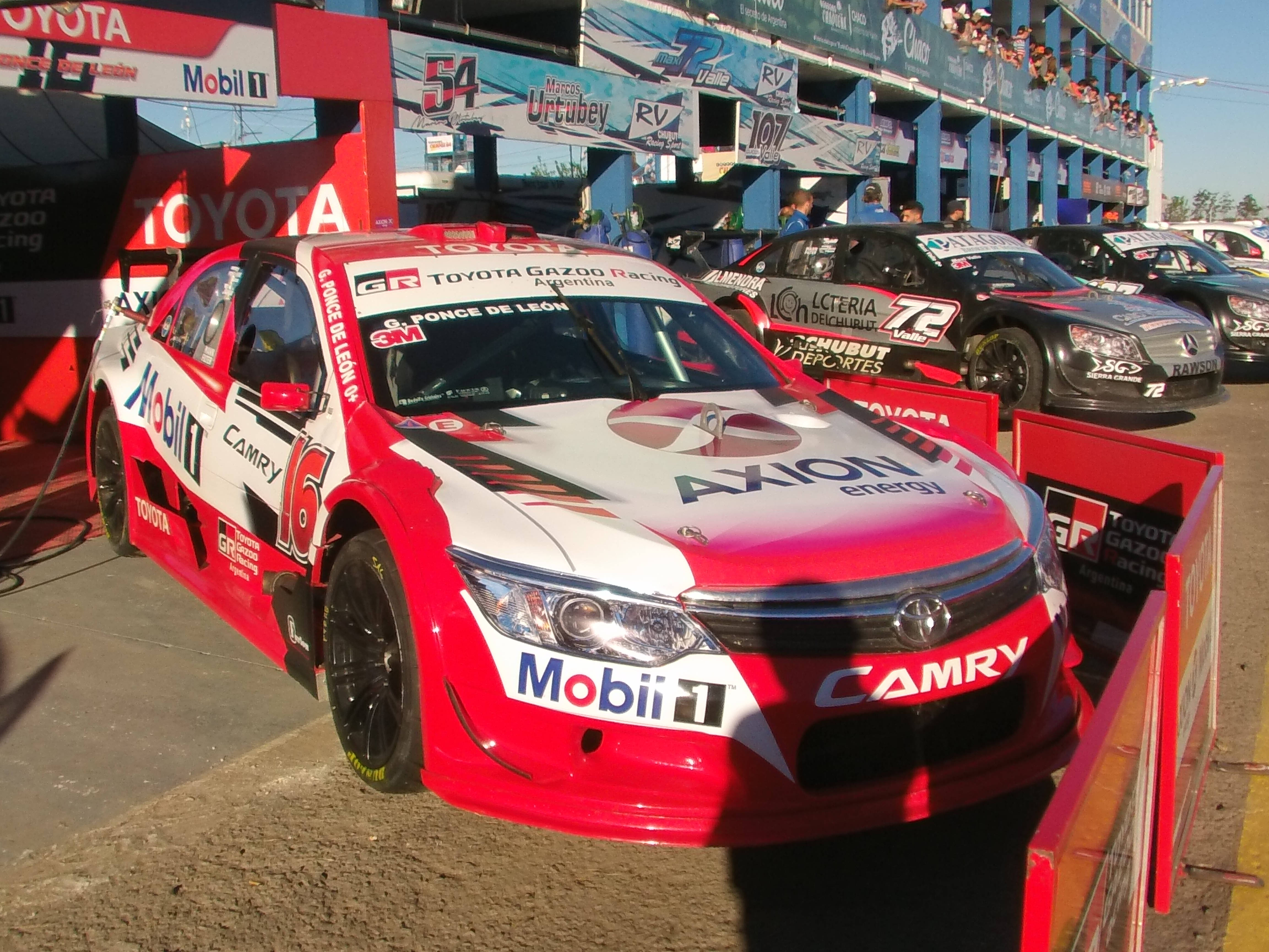 Unidad Toyota Camry estrenada en el año 2017 para la categoría argentina de automovilismo de velocidad Top Race V6